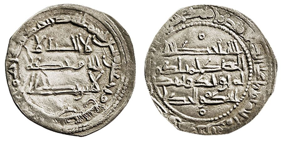 MOHAMMAD I. Dírhem. AR. Al Andalus. 249 H. V.257 vte. MBC+